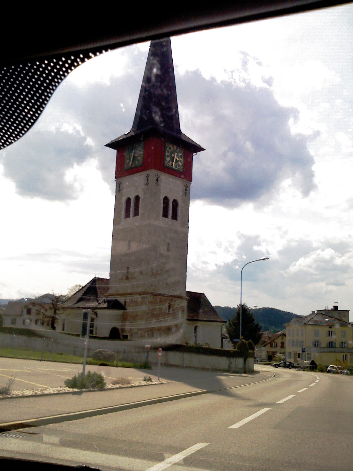 Church of Ganterschwil, Toggenburg, Switzerland - Kirko de Ganterschwil en Togenburgo (Furth), Svislando